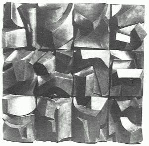 Colección Néstor